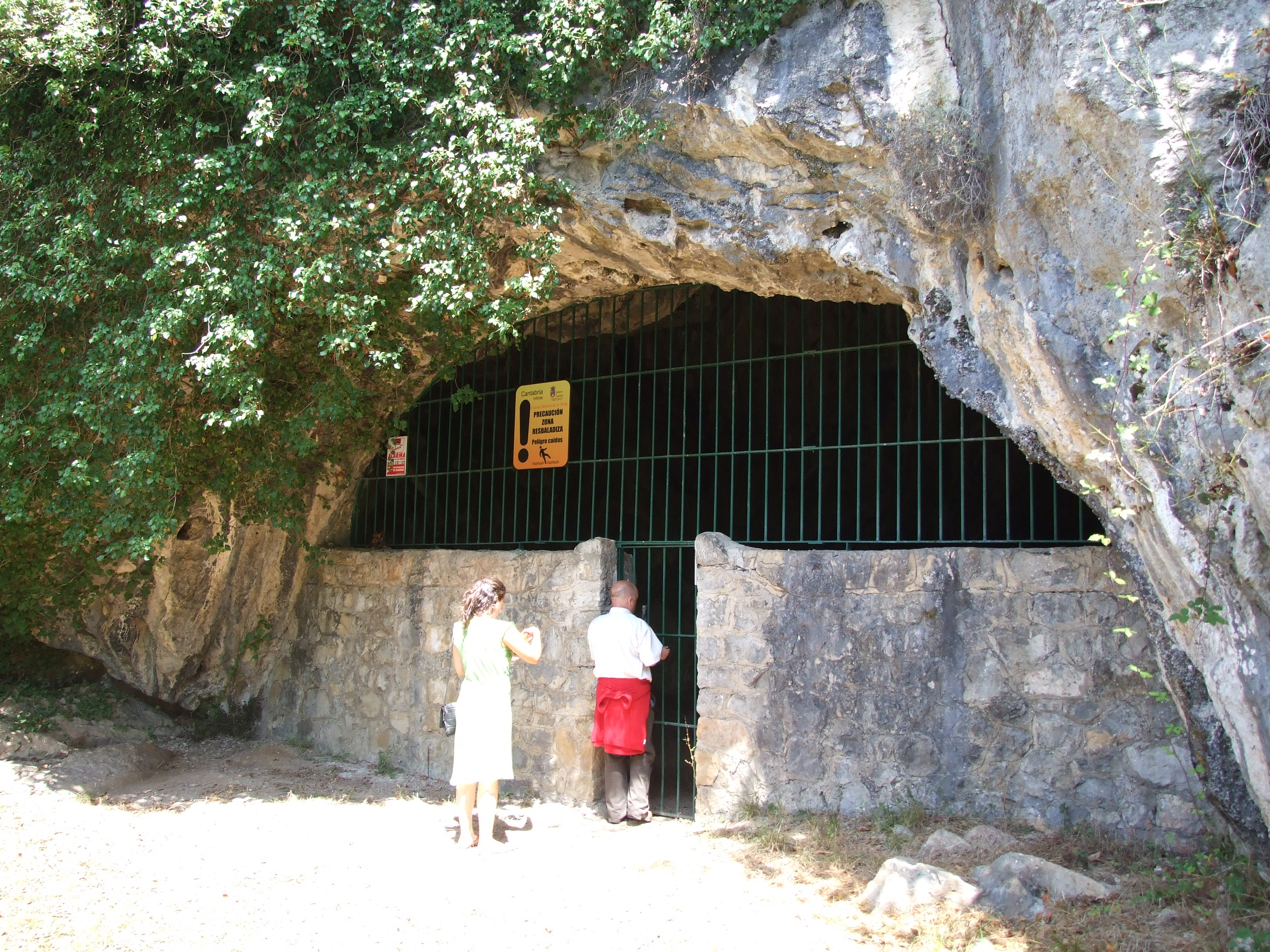 Entrada a la Cueva de Hornos de la Peña, Cantabria